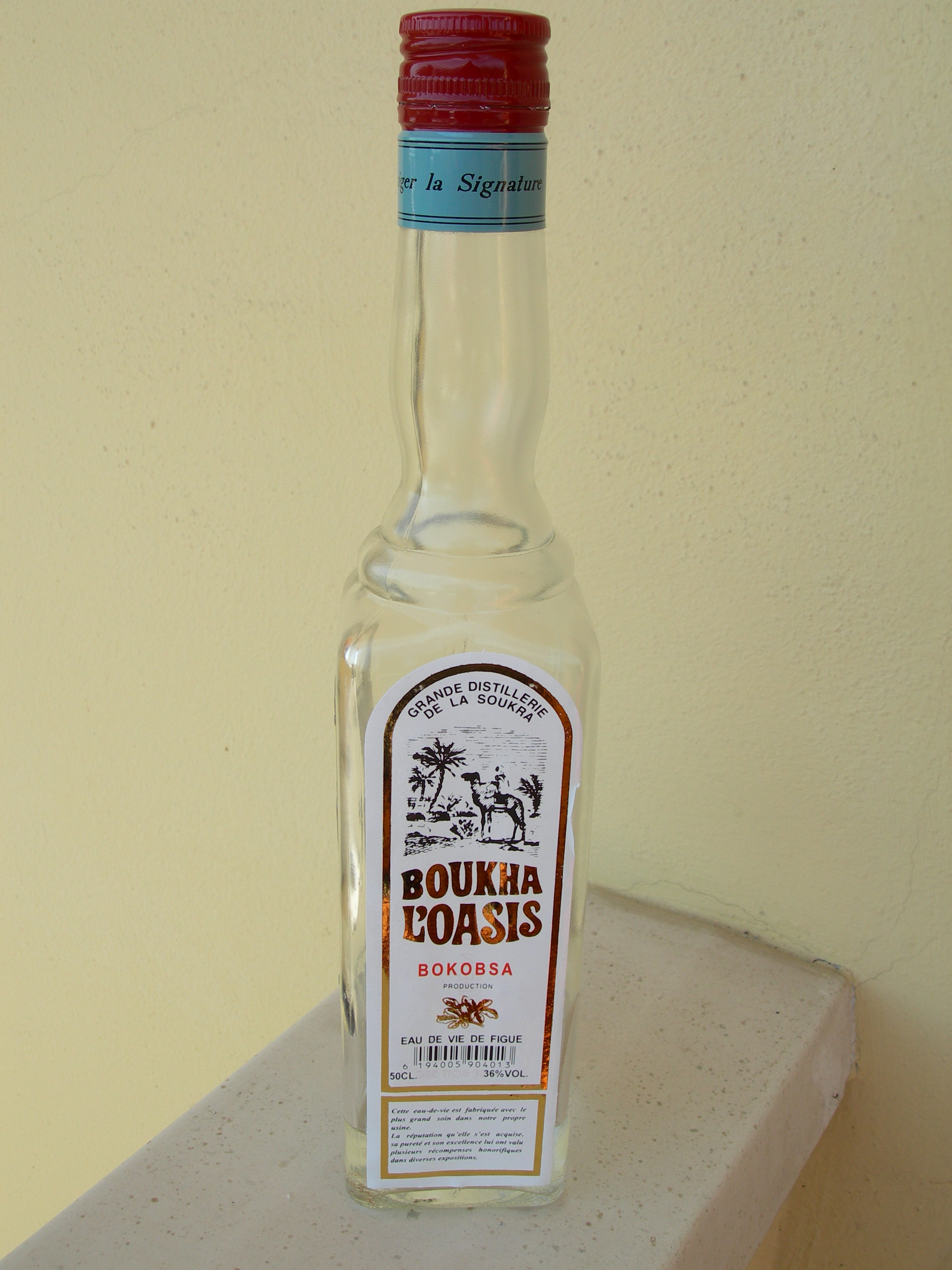 Bouteille de boukha tunisienne